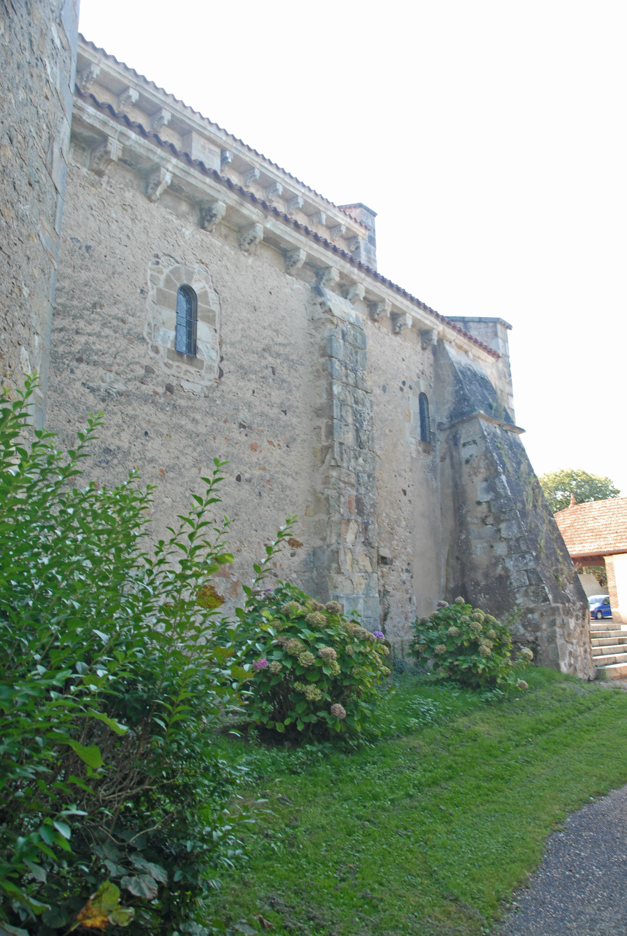 St.-Jean Glaine-Montaigut, Langhaus Nordwand